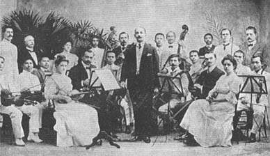 Toneel Braga musical drama group.